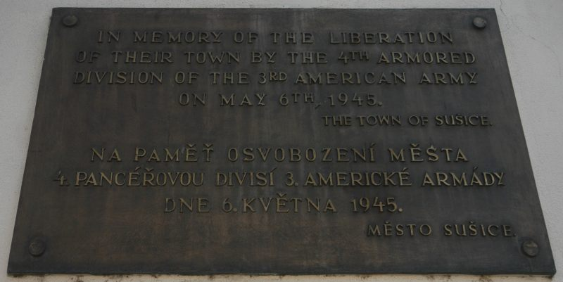 Sušice, Gedenktafel an die Befreiung der Stadt durch US-Truppen im Jahr 1945